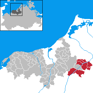 Amt Tessin-Land in Mecklenburg-Vorpommern - District Bad Doberan